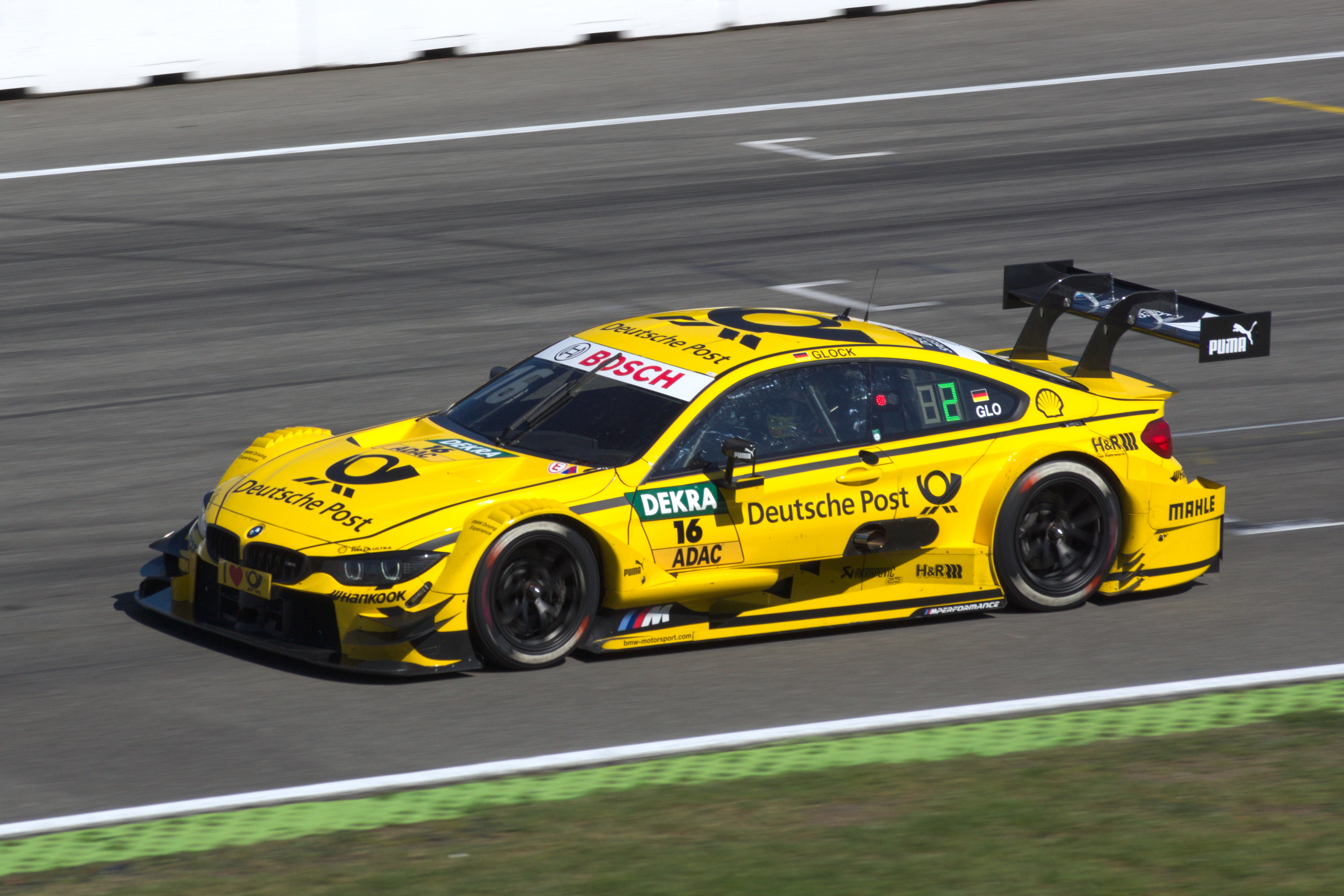 DTM. 08.05.2016 in Hockenheim. Race 2